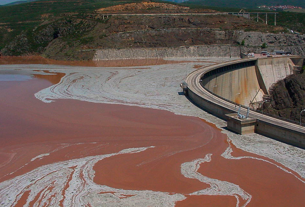 Las aguas de El Atazar teñidas de rojo por la presencia de algas